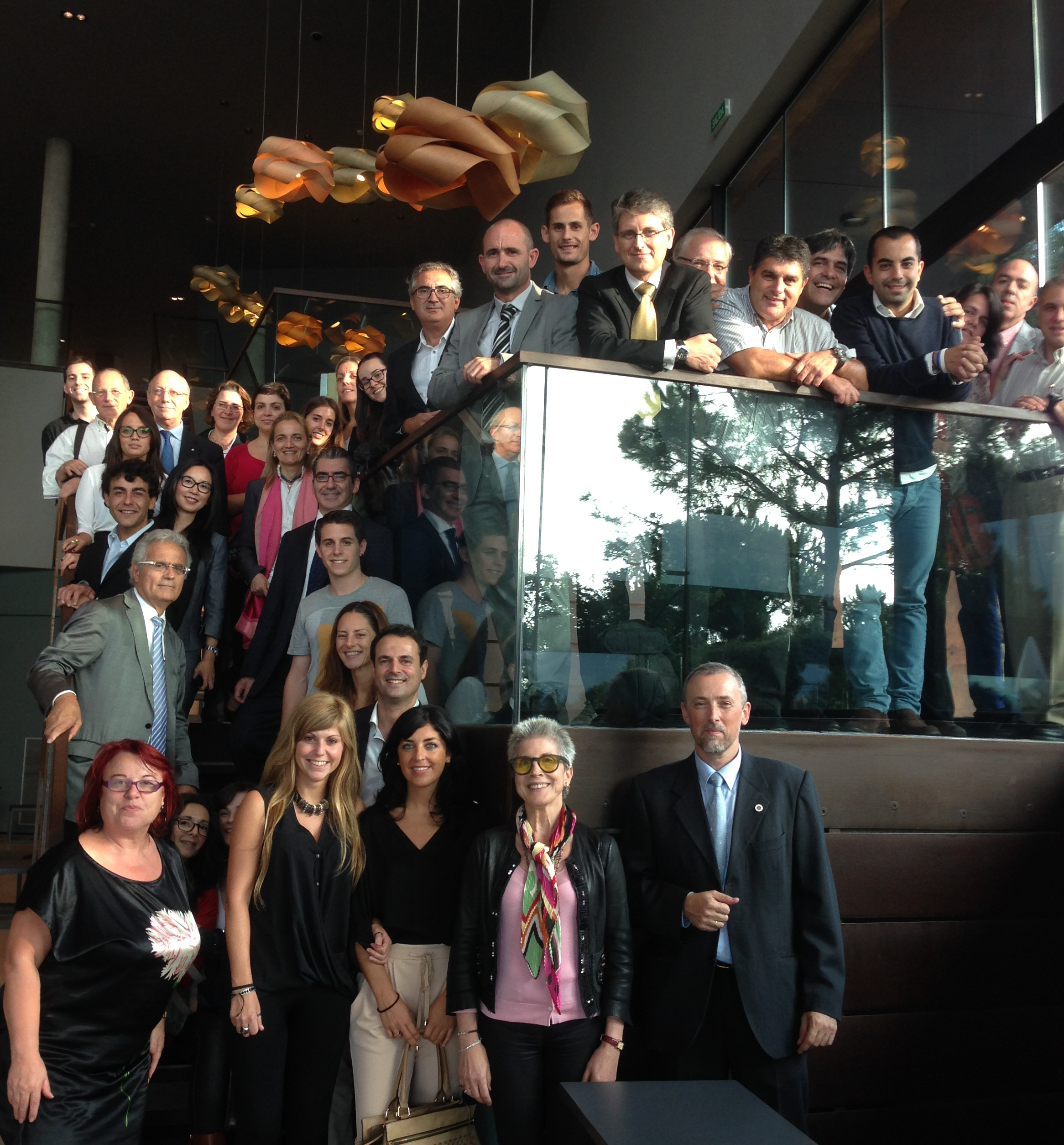 Reunión de la Fundación García Cugat 2014